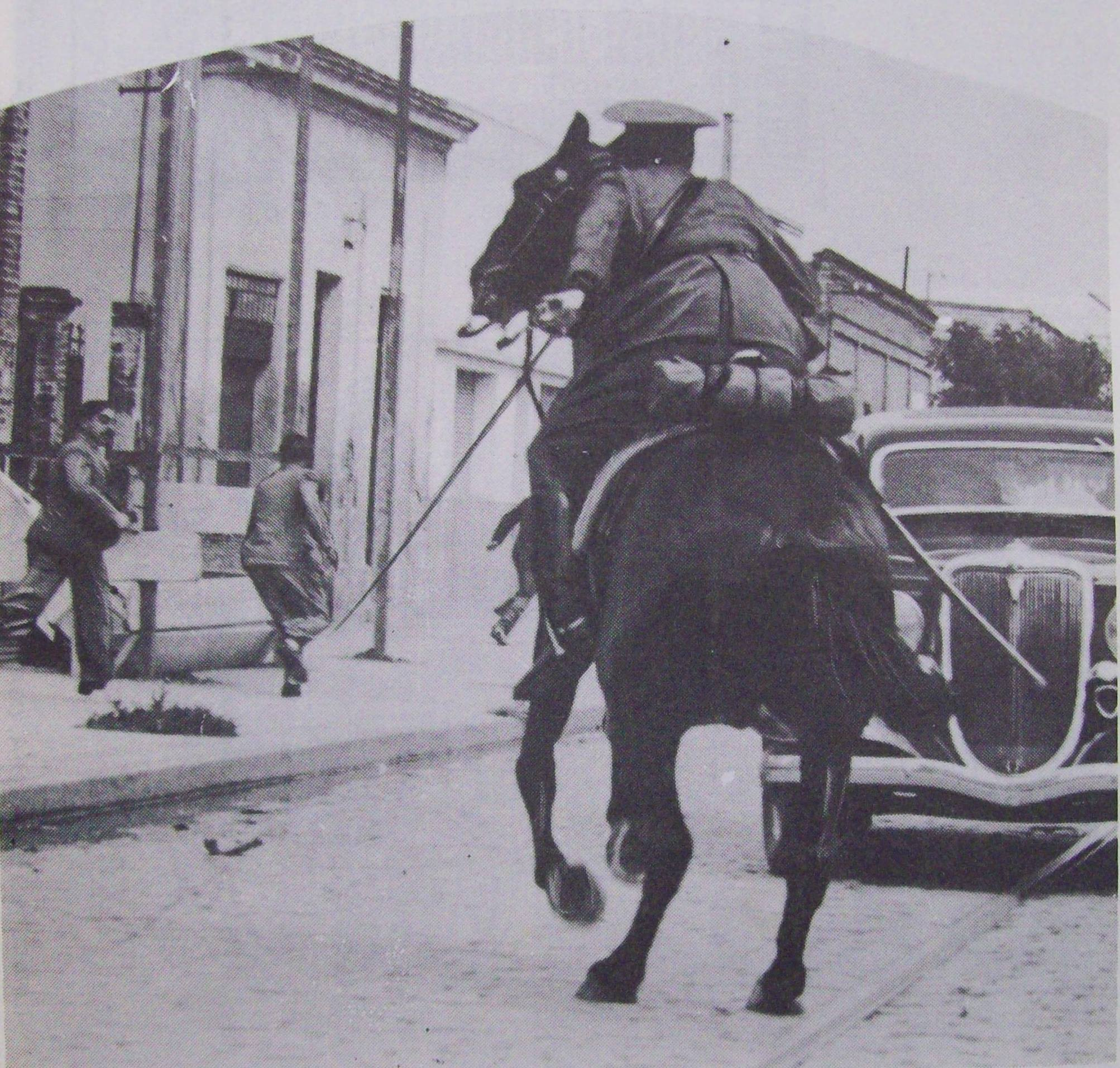 Un policía persigue a partidarios del radicalismo en el tiempo en que los conservadores detentaban el poder.